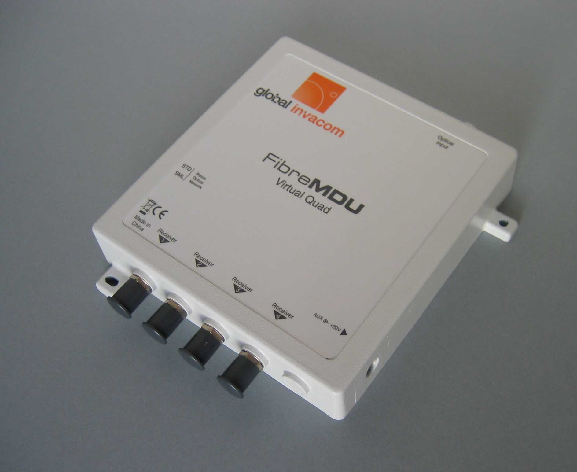 Fibre converter